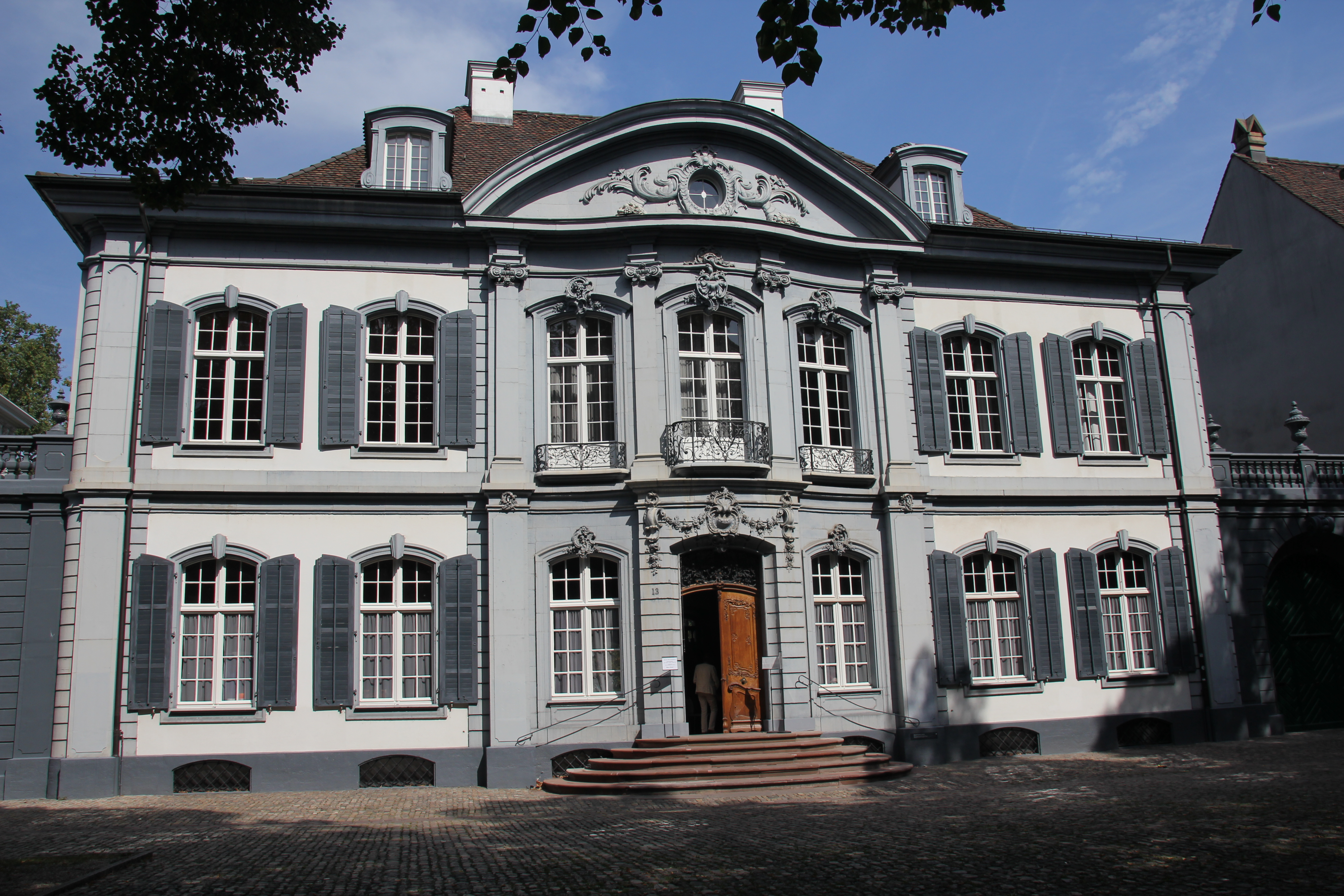 Wildtsches Haus